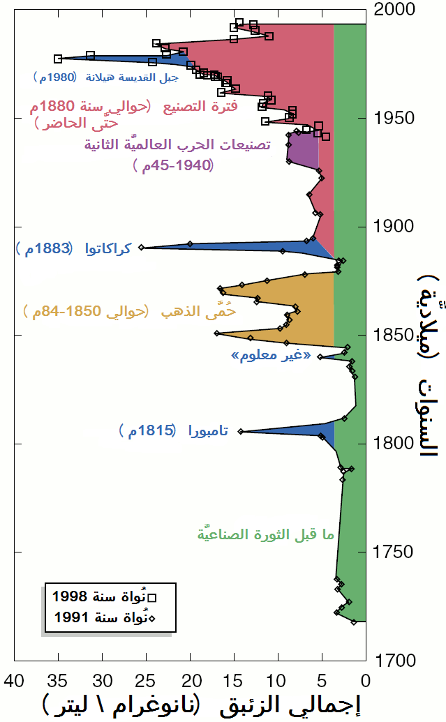 يُظهرُ هذا الرسم البياني مُستوى ترسُّب الزئبق في الجو، وفق ما أظهره تفحُّص بعض ألباب القطع الجليديَّة من أعالي مُجلَّدة فيرمونت في ولاية وايومينغ الأمريكيَّة. نسب الترسُبات المُشار إليها تُشيرُ بِدورها إلى بعض الأحداث البُركانيَّة والجويَّة التي وقعت خِلال السنوات المائتين والسبعون (270) الماضية. مُعدلاتُ الزئبق العائدة لِلفترة السابقة على الثورة الصناعيَّة يُمكنُ استقرائها بِتحفط وقياسُها على الفترة الحاليَّة )4 نانوغرامات \ الليتر؛ بِاللون الأخضر) في سبيل إظهار نسبة التزايُد خِلال السنوات المائة المُنصرمة (بِالأحمر)، والتراجُع الحاد خِلال السنوات الخمسة عشر إلى العُشرون الماضية.